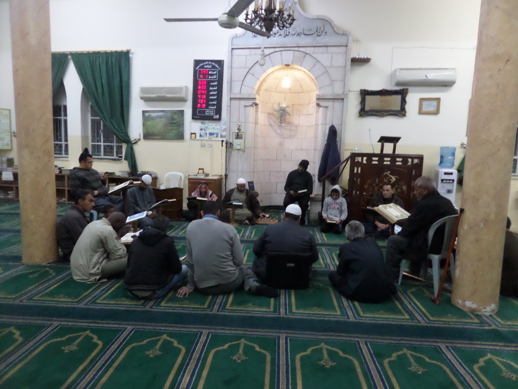 حلقة القرآن الكريم